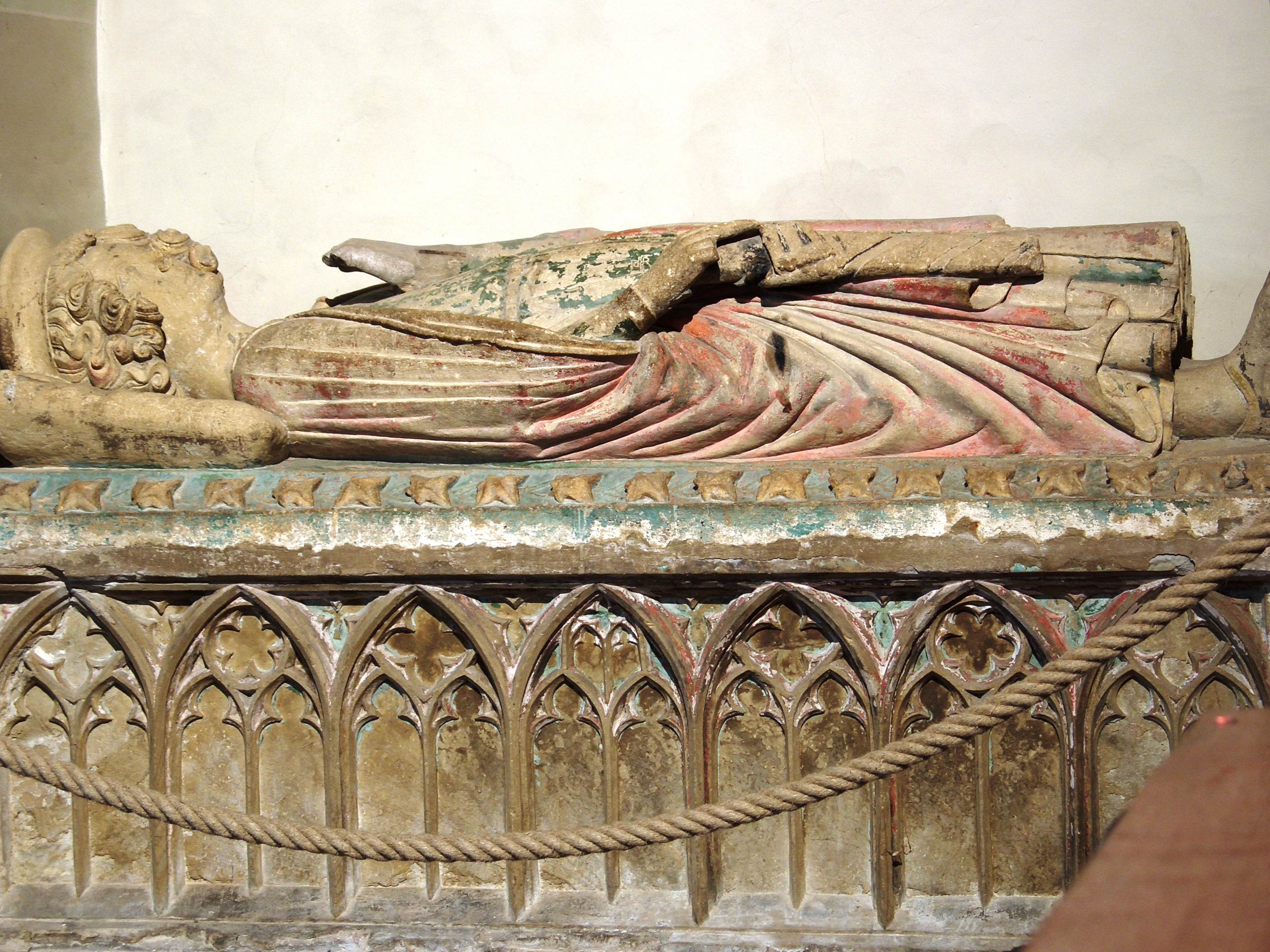 Abadia de Murbach - Tomba d'Eberhard